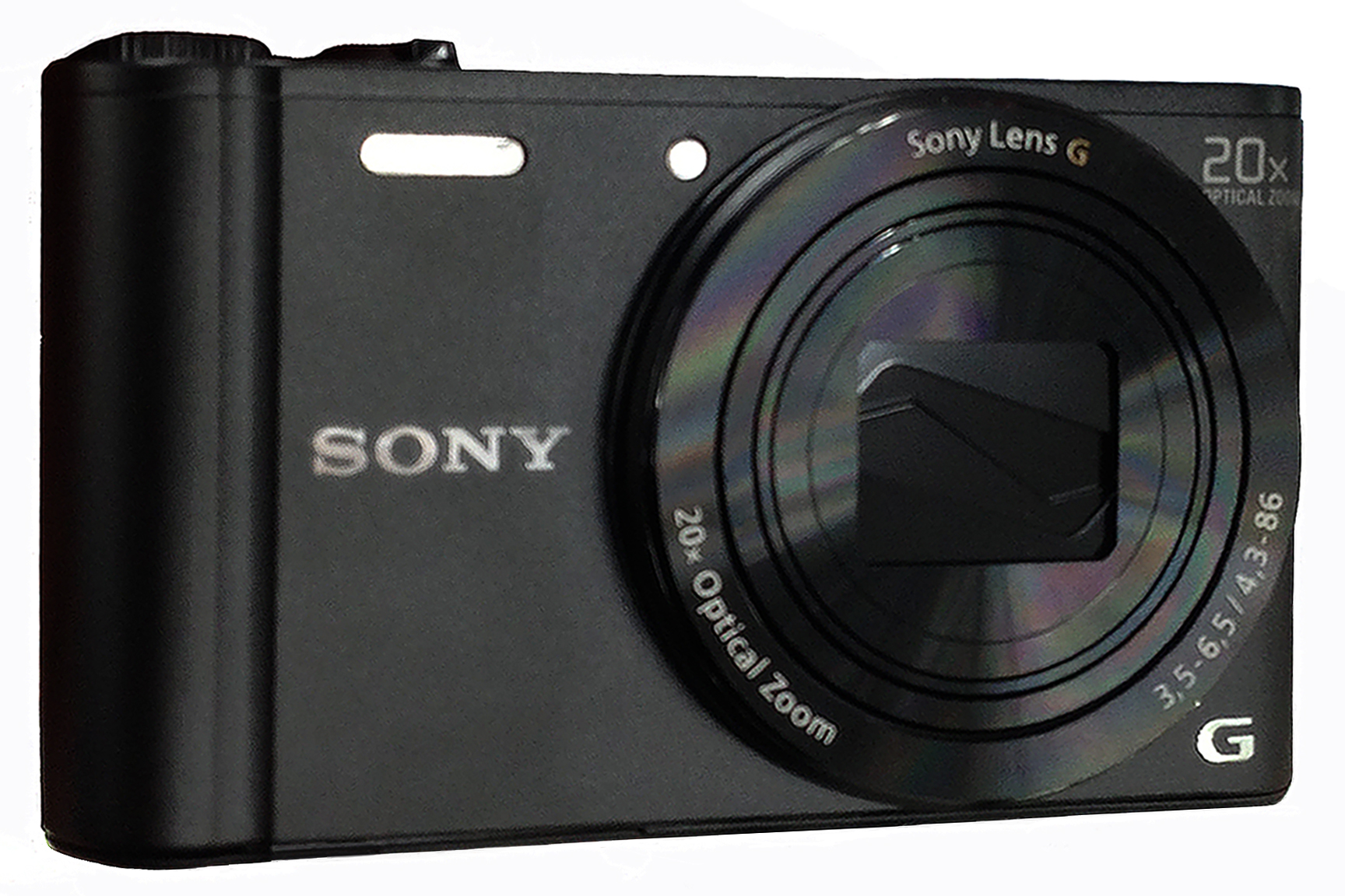 Sony Cyber-shot DSC-WX300 zwart. Kijk ook eens op de weblog van de auteur.